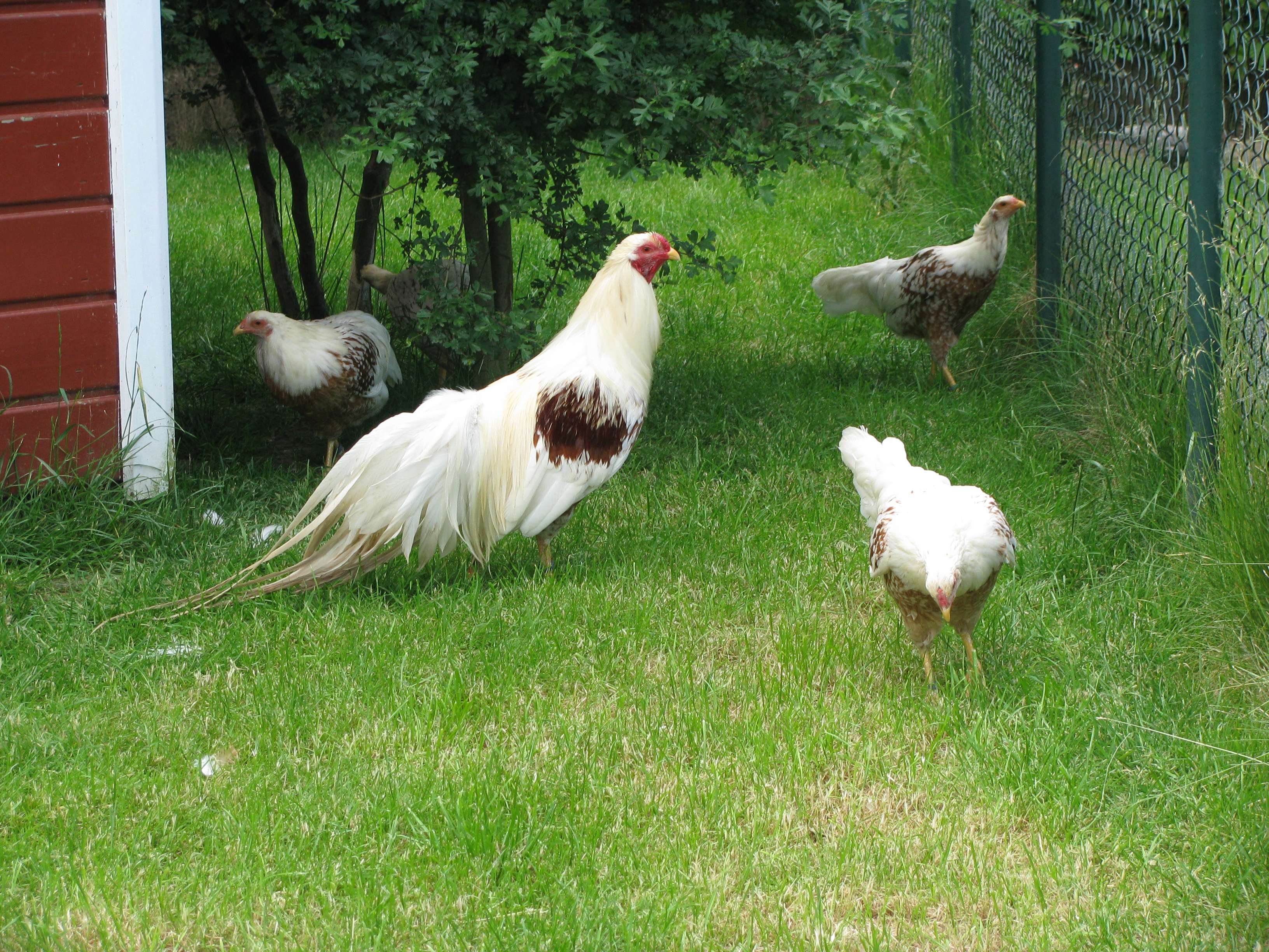 Yokohama-Hühner im Wissenschaftlichen Geflügelhof Sinsteden